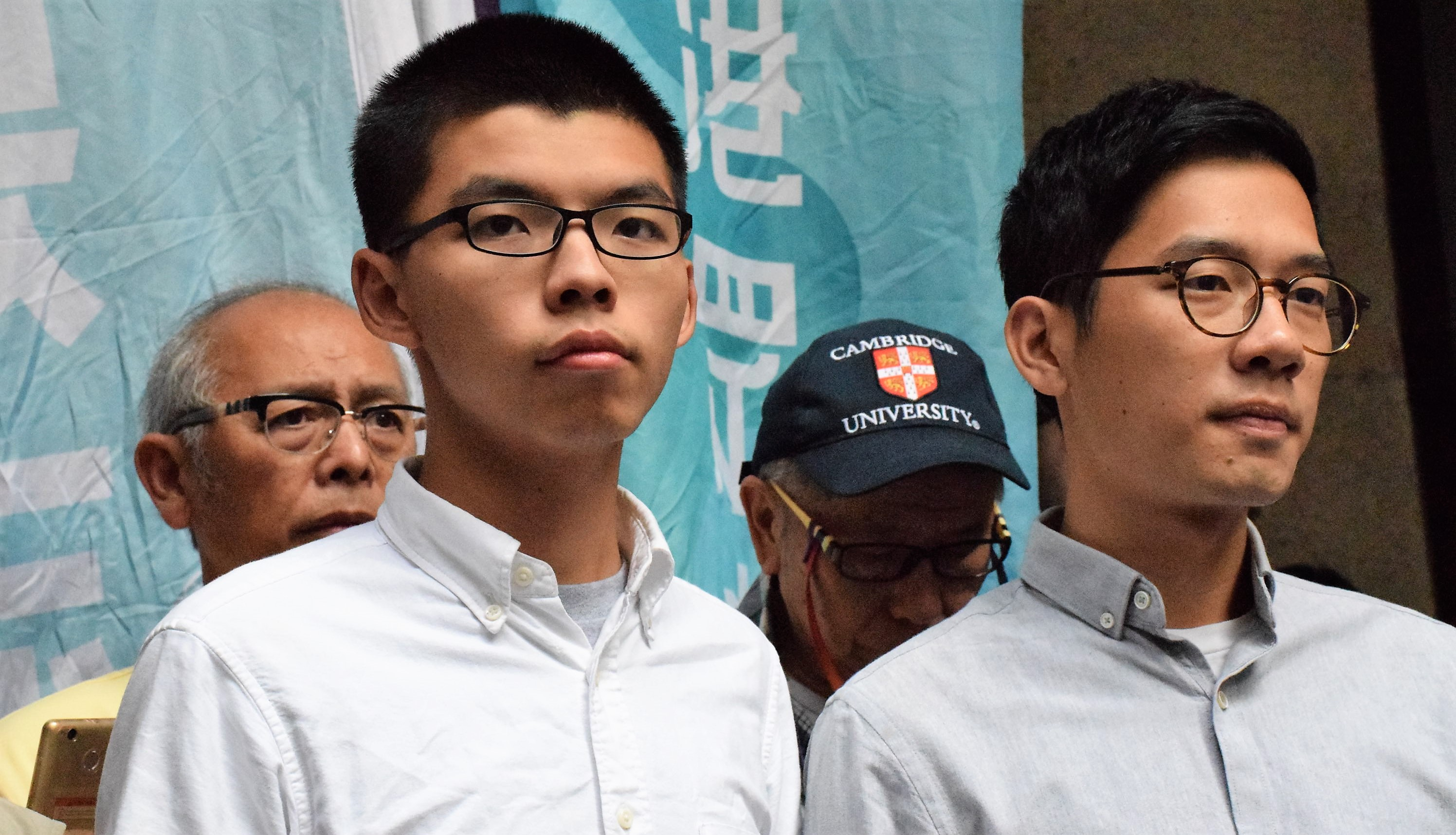 中文（香港）: 香港眾志秘書長黃之鋒(左)及主席羅冠聰